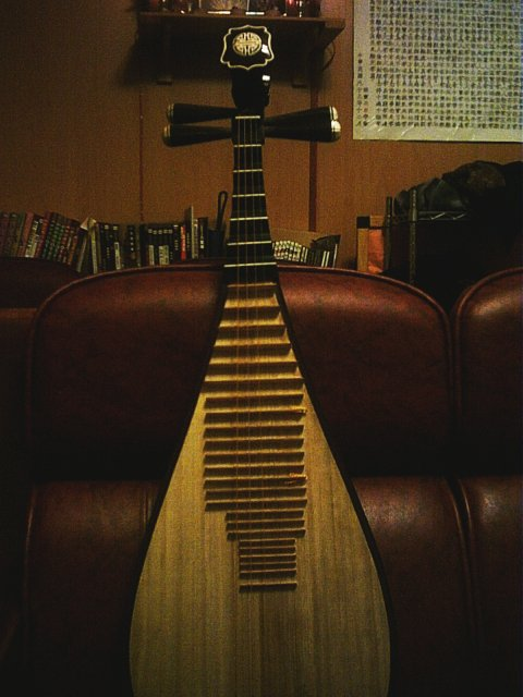 我把自己擁有的的琵琶照起來，我以此GFDL授權發佈我的照片。